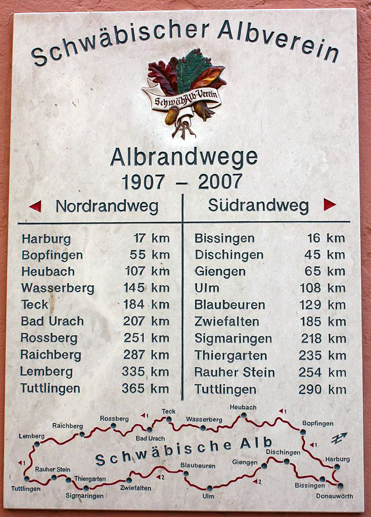 Die Streckentafel beim Startpunkt des Schwäbische-Alb-Nord- und Südrand-Weges am Rathaus in Donauwörth.